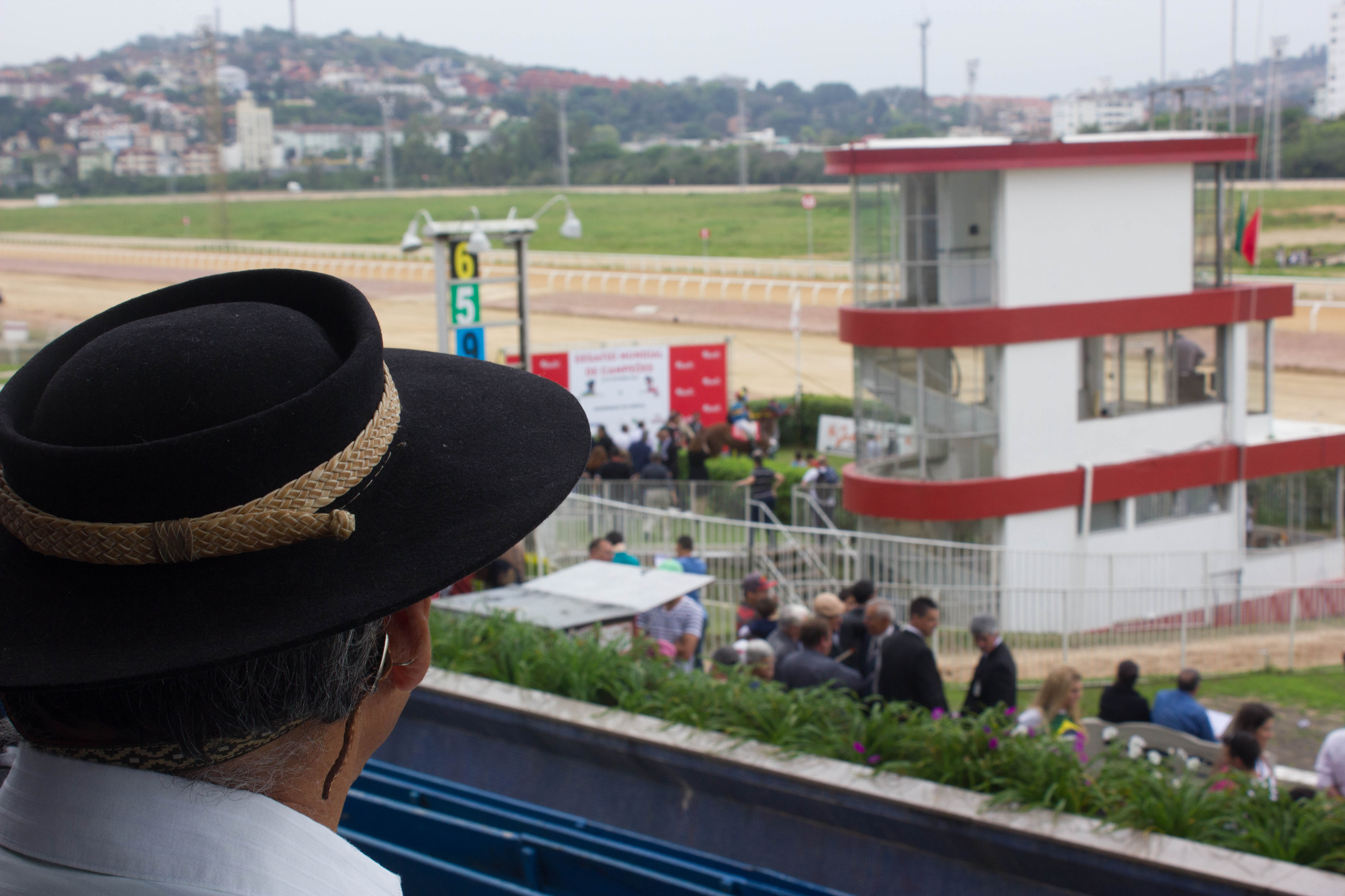 Espectador assiste à premiação de um dos páreos. Foto: Yanlin Costa (3º semestre)